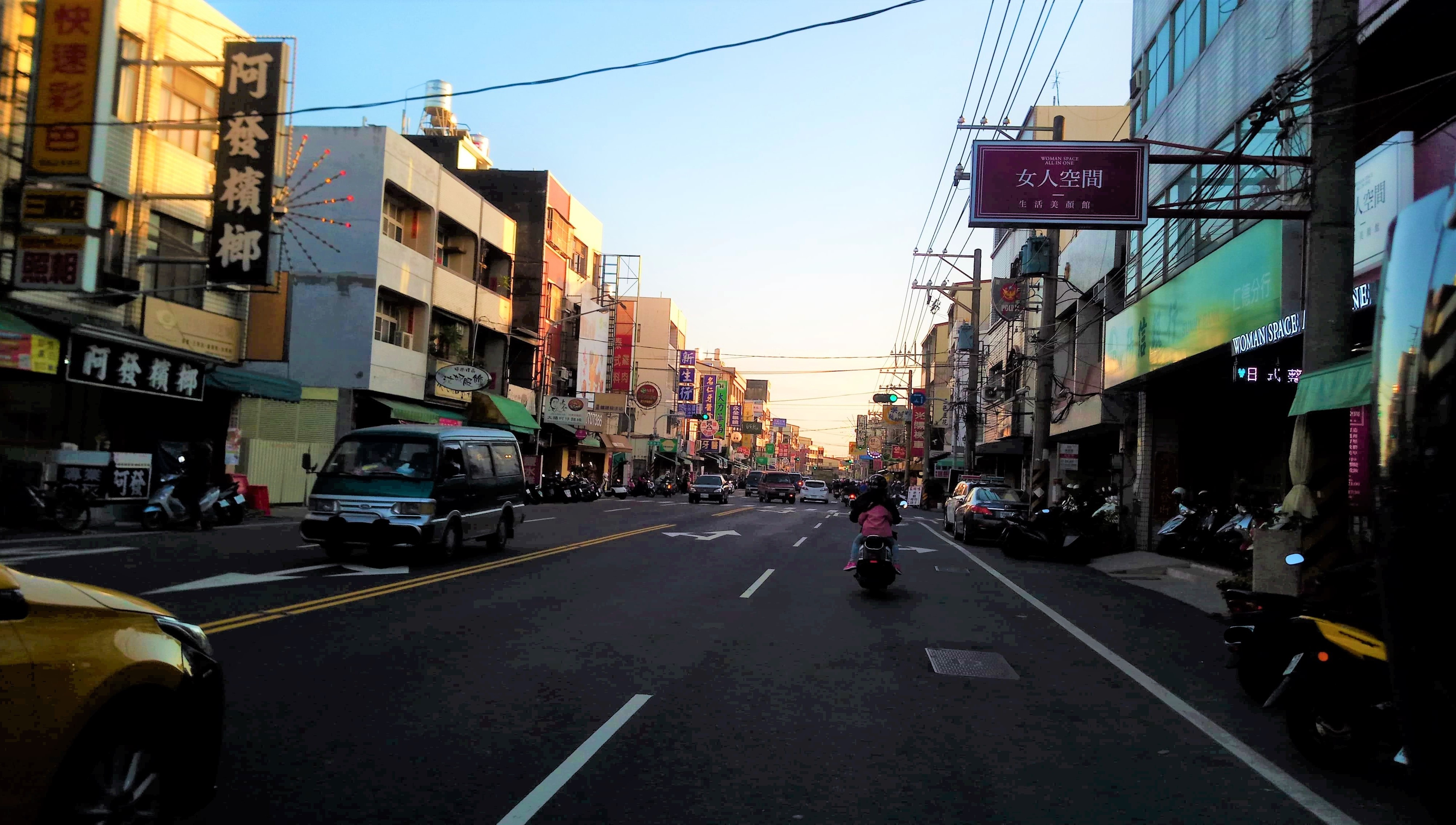 後壁厝市區-中正路二段(陽信銀行)